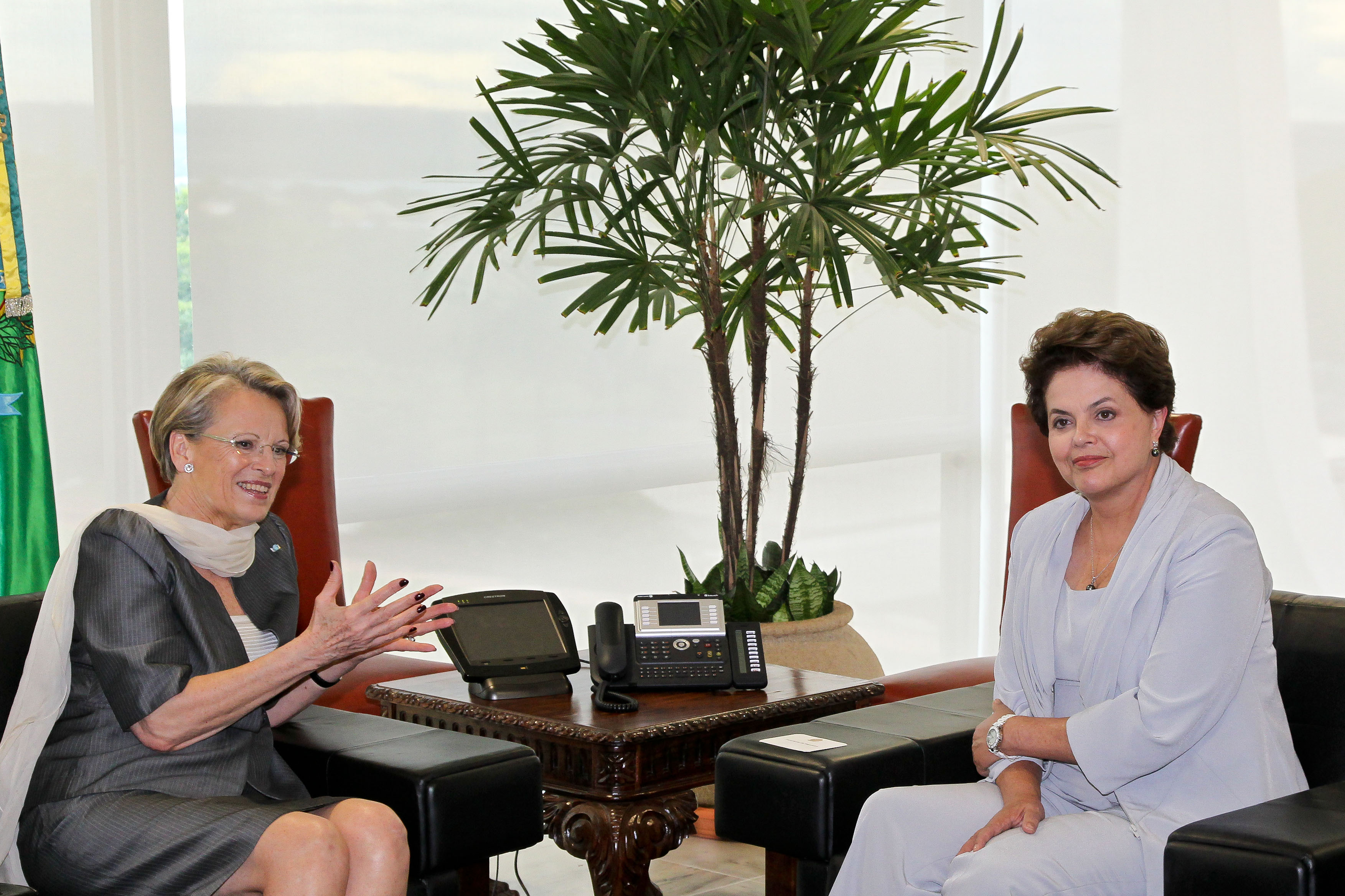 22/02/2011. Brasília-DF. Presidenta Dilma Rousseff recebe Michèle Alliot-Marie Ministra de Negócios Estrangeiros da França. Foto: Roberto Stuckert Filho/PR.